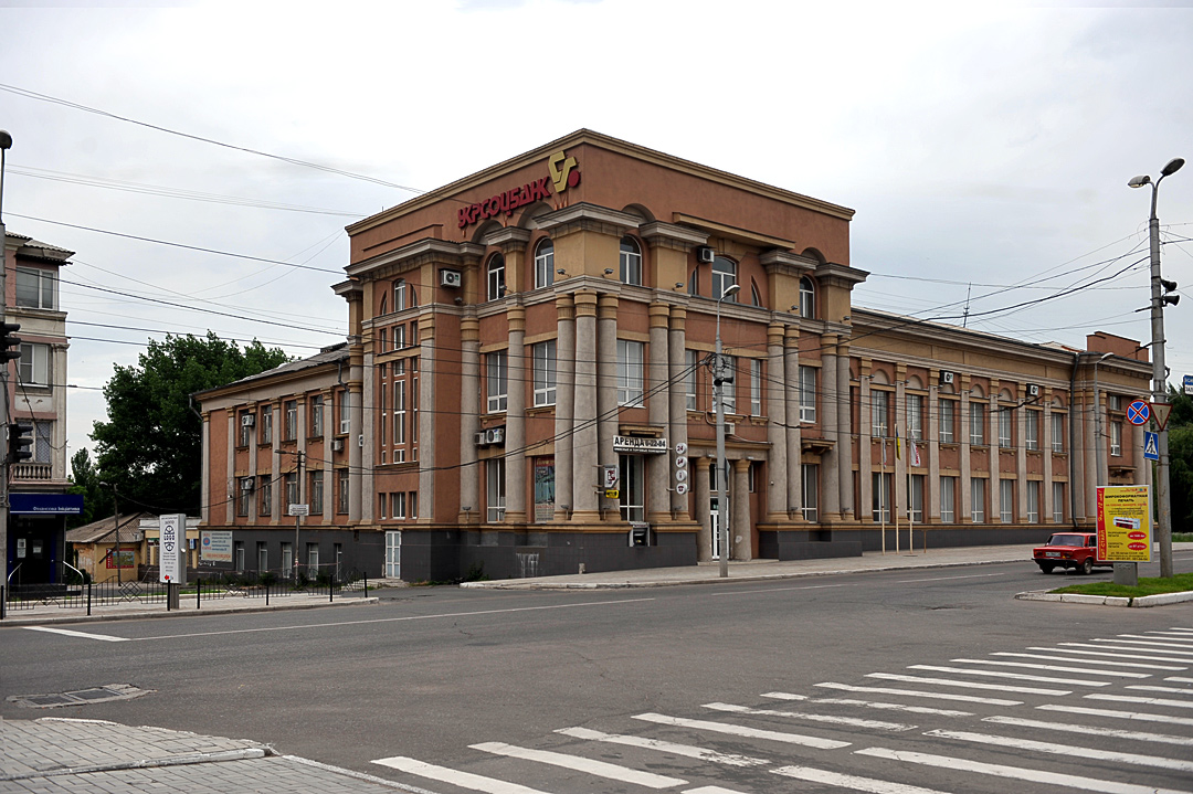 Макеевка. Улица Театральная